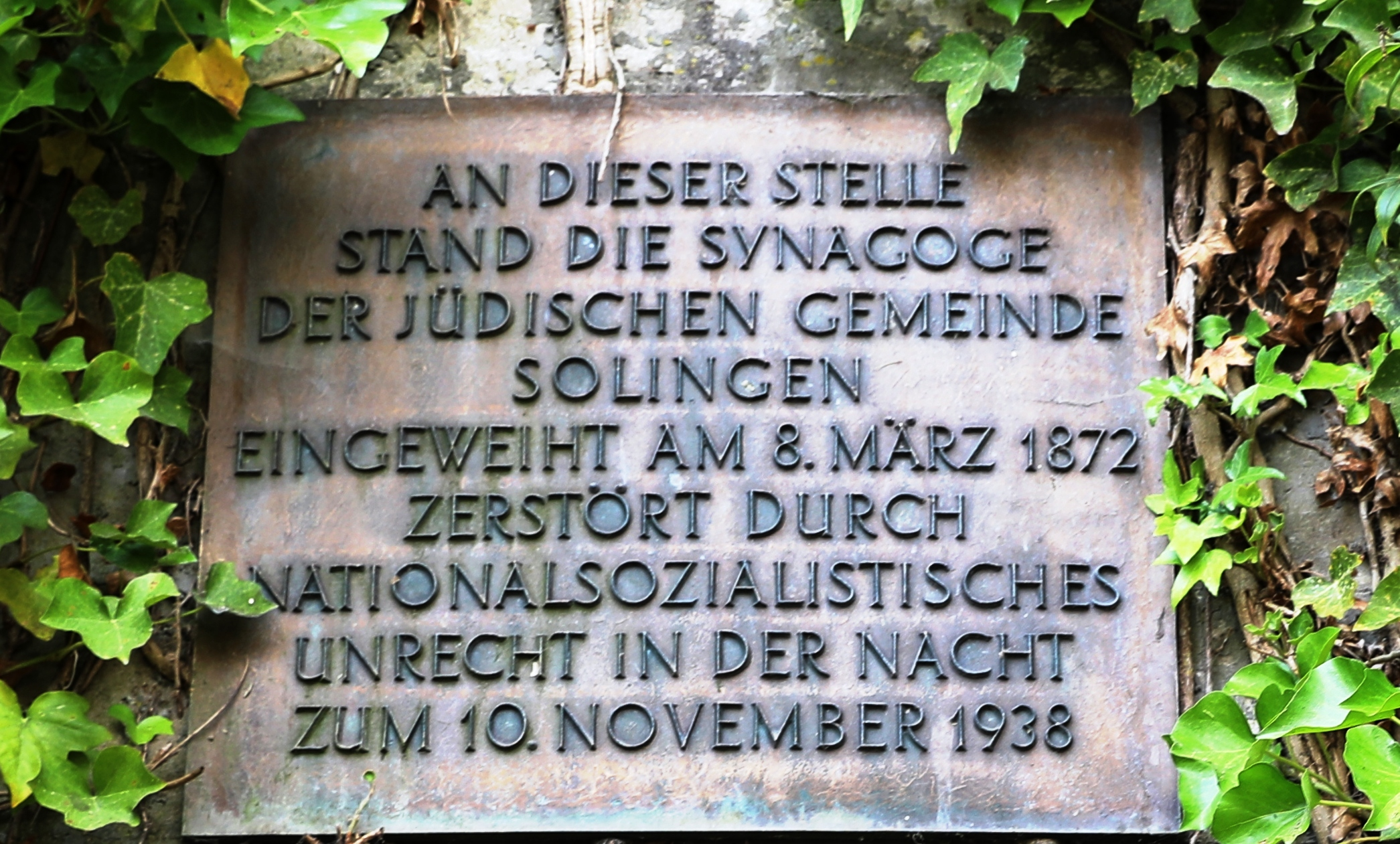 Tafel am Hochbunker an der Malteserstraße in Solingen, früherer Standort der Solinger Synagoge